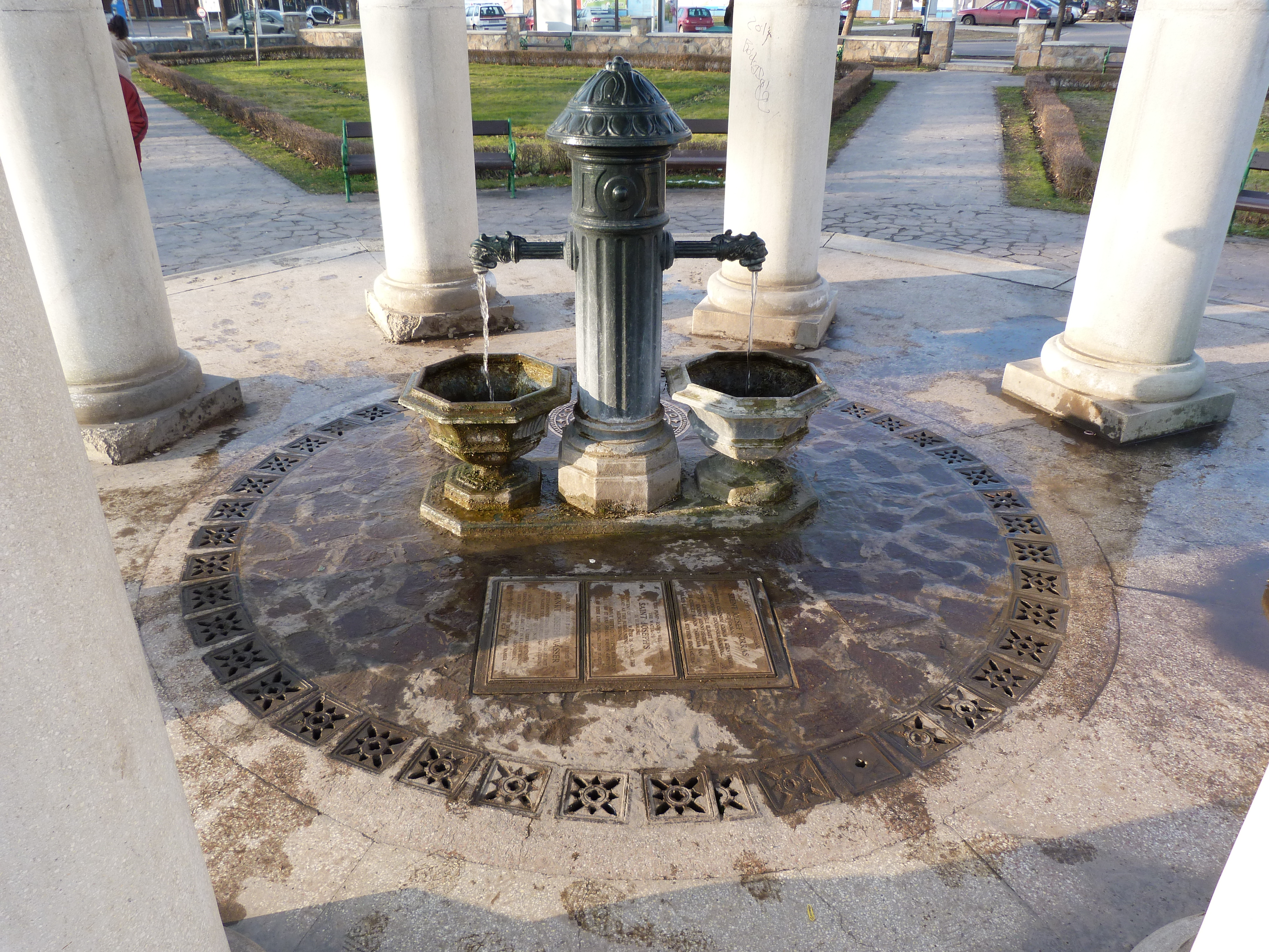 A felvétel 2014. február 5 -én szerdán készült Egerben. Szent József Forrás. ©© Derzsi Elekes Andor, Budapest, 2014, A kép és filmfelvételek egészben, vagy részletekben másolását, bármilyen úton történő sokszorosítását és felhasználását a szerző ellenérték nélkül, jogutódjaira is kihatóan megengedi. Az engedély kiterjed a kereskedelmi célú hasznosításra is. Kéri azonban nevének feltüntetését a felhasználás során. A Metapolisz sorozat valamennyi képe és filmje Creative Commons alatti valamint kereskedelmi - for profit - célra is felhasználható. Ajánlott hivatkozás: Derzsi Elekes Andor: Metapolisz DVD line